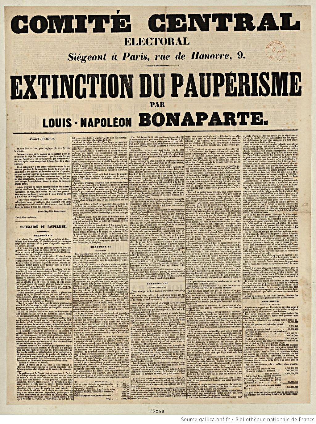 Louis-Napoléon Bonaparte, Comité central Électoral Siégeant à Paris, rue de Hanovre, 9. Extinction du paupérisme. Reproduction de 5 chapitres de la brochure du prince, impr. recto-verso sur 5 colonnes, avec des tableaux statistiques imprimés verticalement. Le bas du verso est occupé par le texte du n° 15.246 et par le "Guide de l'électeur" in Recueil, Collection de Vinck. Un siècle d'histoire de France par l'estampe, 1770-1870. Vol. 123, (pièces 15217-15323), République de 1848, Réf. bibl. : De Vinck, 15248.